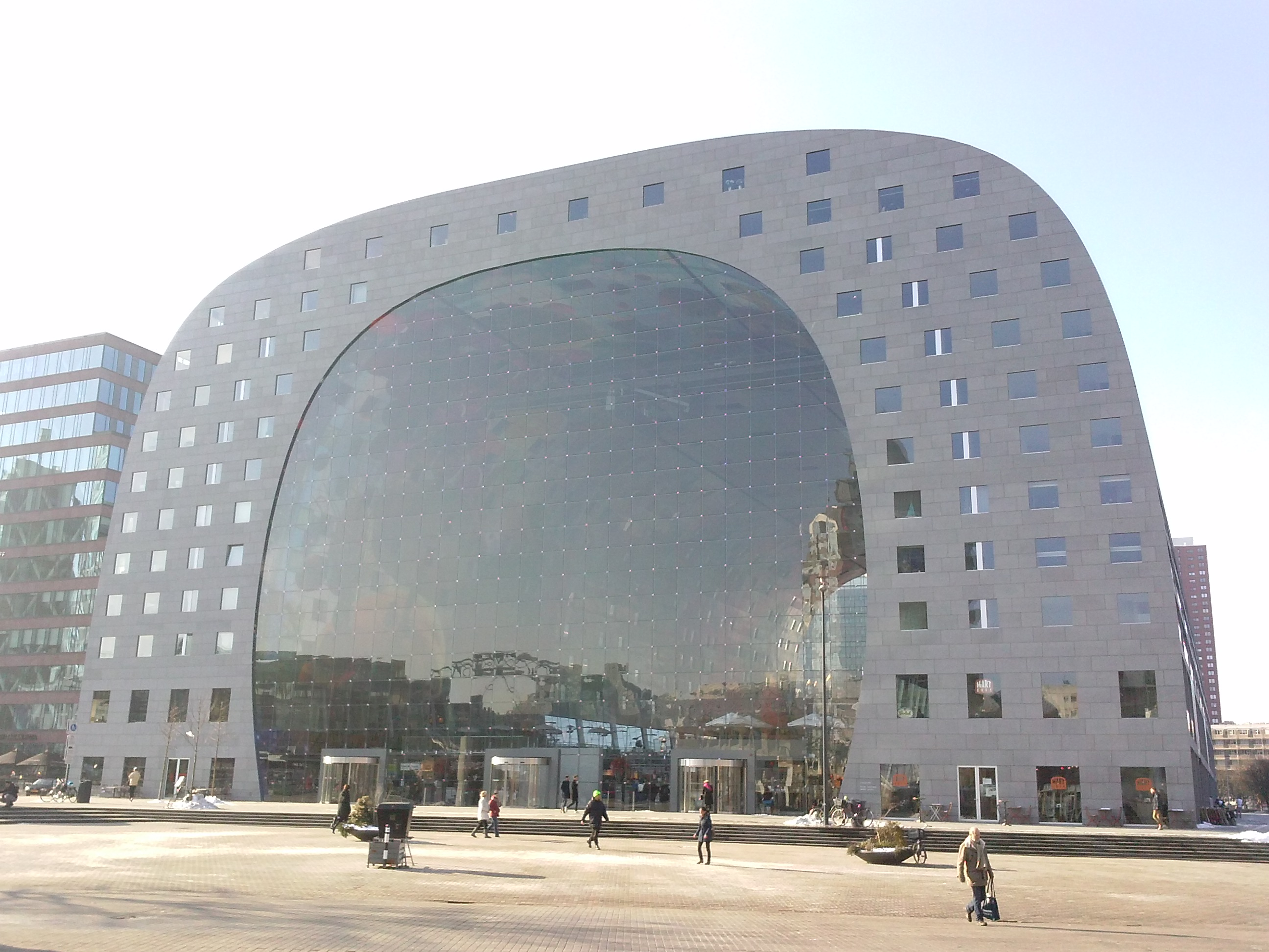 De Markthal Rotterdam in 2015